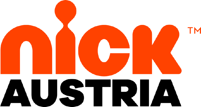 Logo des österreichischen Ableger Nick Austria